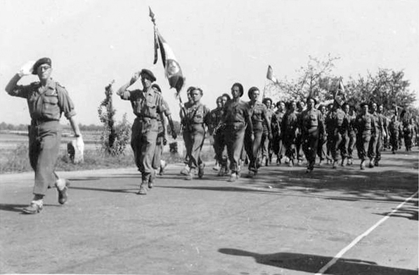 Été 1945 Ravensburg (Allemagne). Le lieutenant-colonel Gambiez défile en tête du 1er groupement de Choc (bataillon de Choc et commandos de France). Collection Henri Simorre.Autorisation de publier la photographie via le site (Cf.